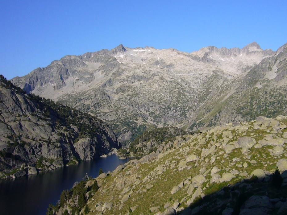 Massís de Besiberri vist des del Refugi Joan Ventosa i Calvell; la Vall de Boí, Alta Ribagorça, Catalunya